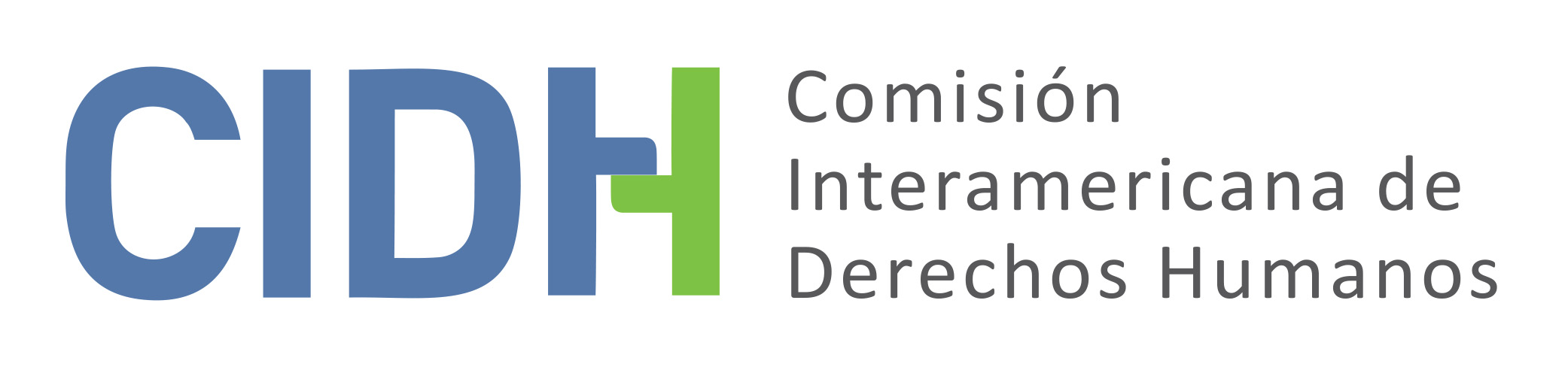 alta-cidh-es